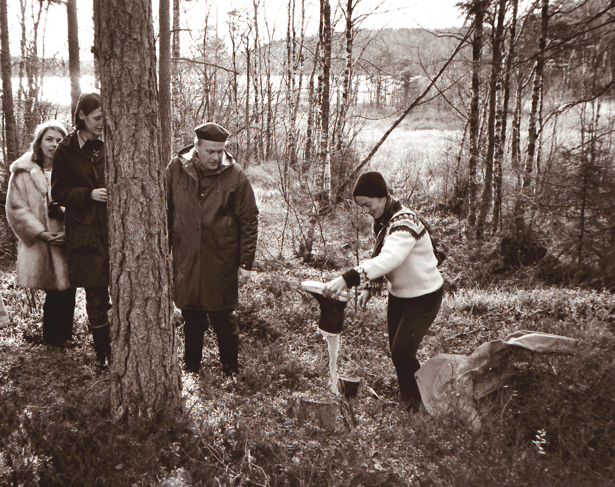 Professor Mats P Malmer med arkeologstudenter i Bohuslän 1970.